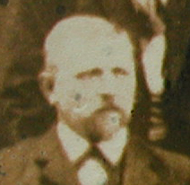 Hermann Heinrich Weitkamp, oud burgermeester van Ambt Hardenberg